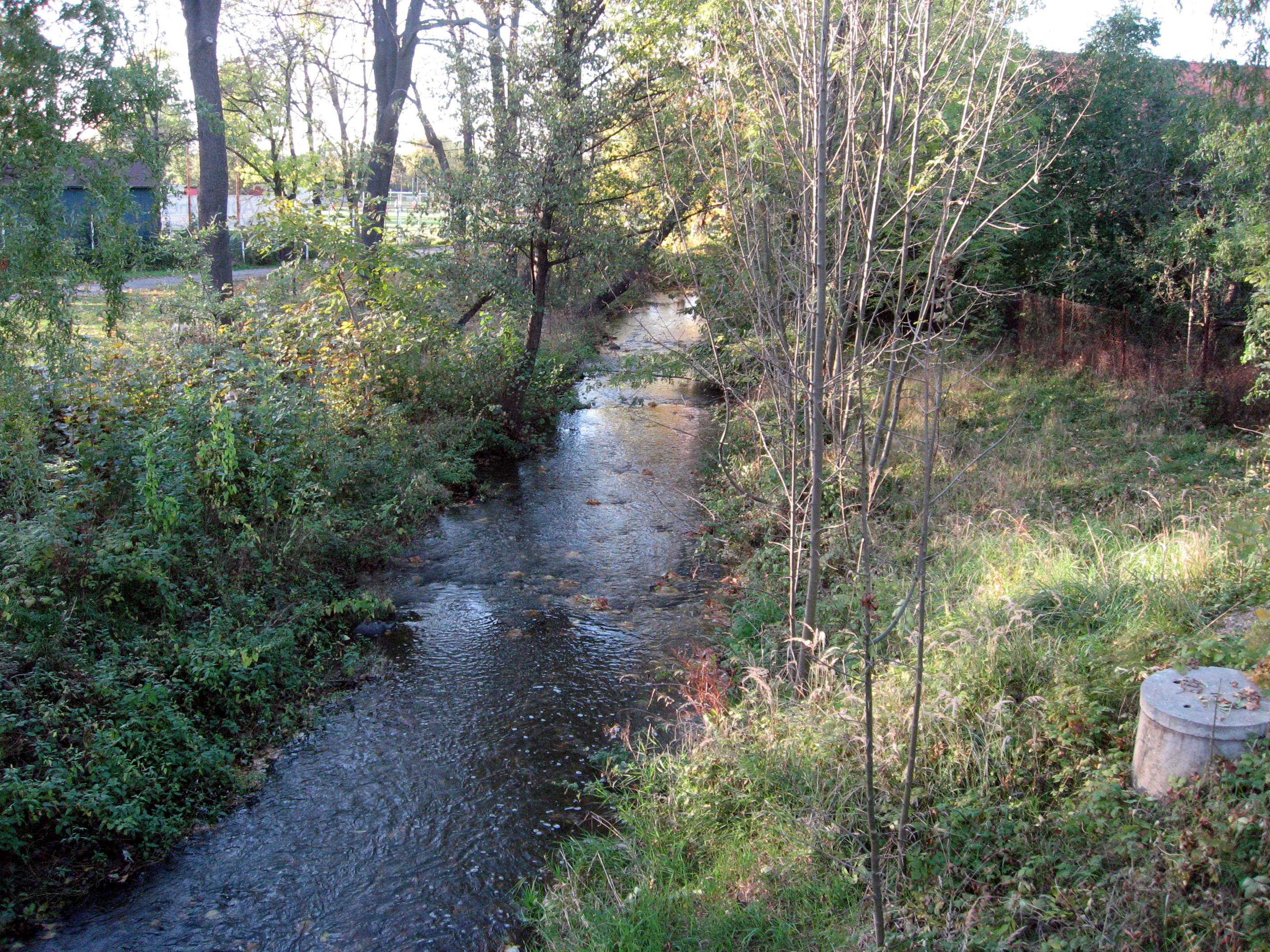 Česky: Rokytka v Dolních Počernicích